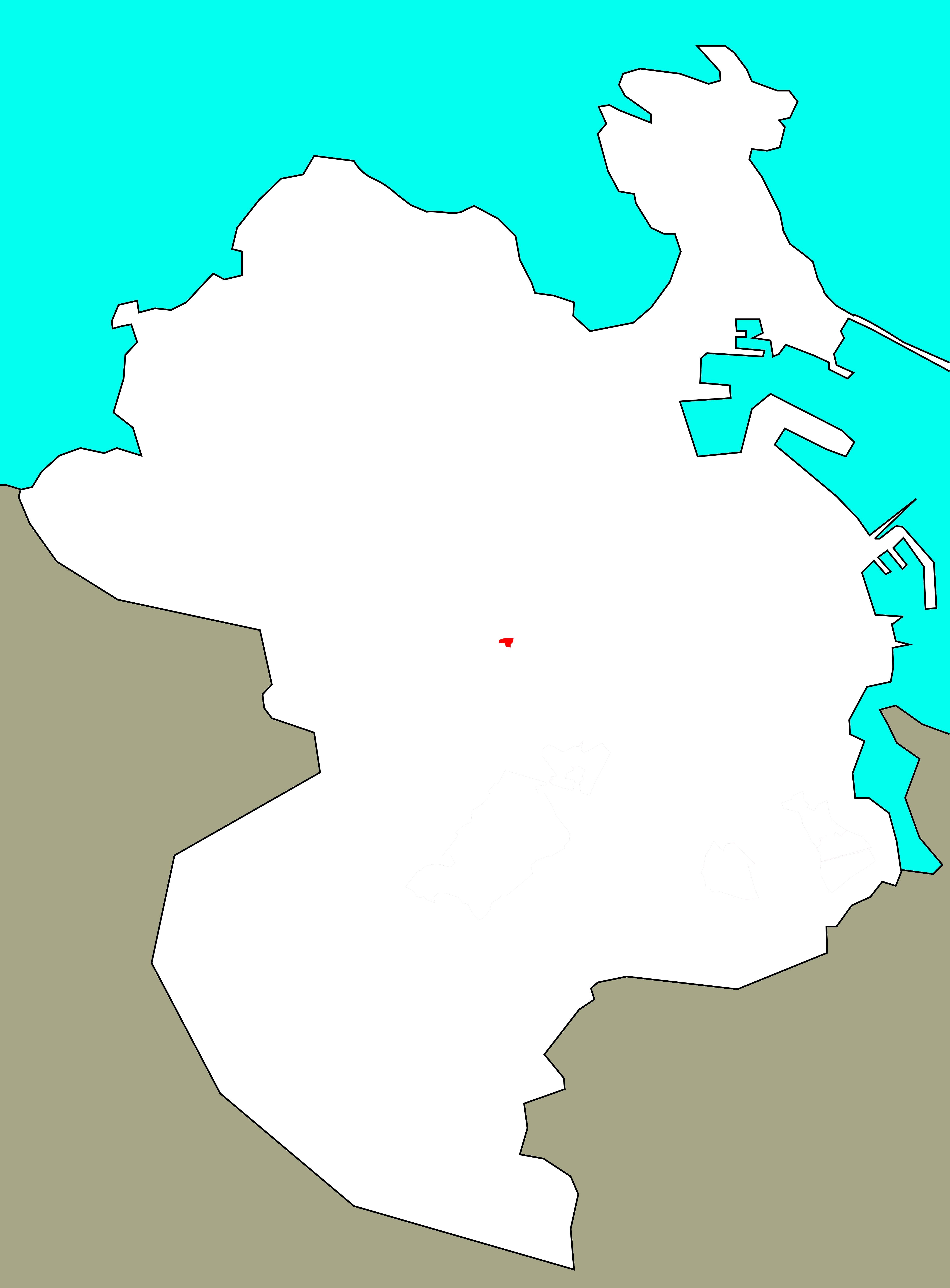 Situación da Cova no concello da Coruña.[1]